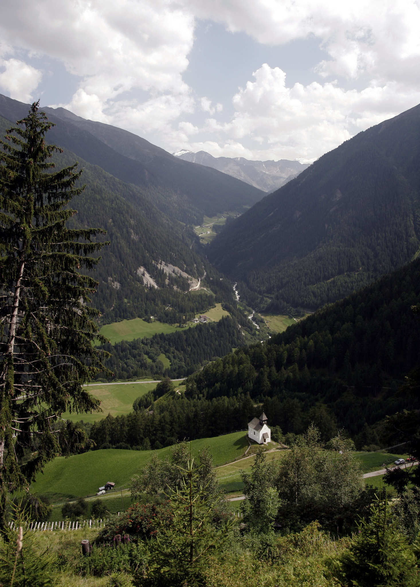 Blick ins Suldental in Südtirol, von Stilfs aus gesehen